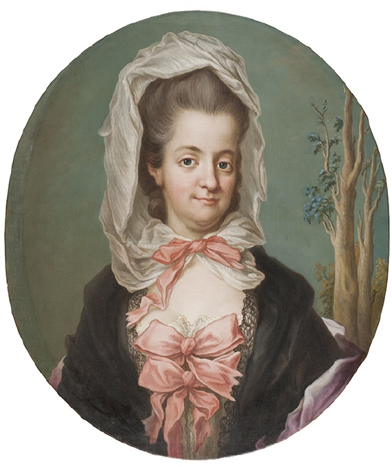 copy